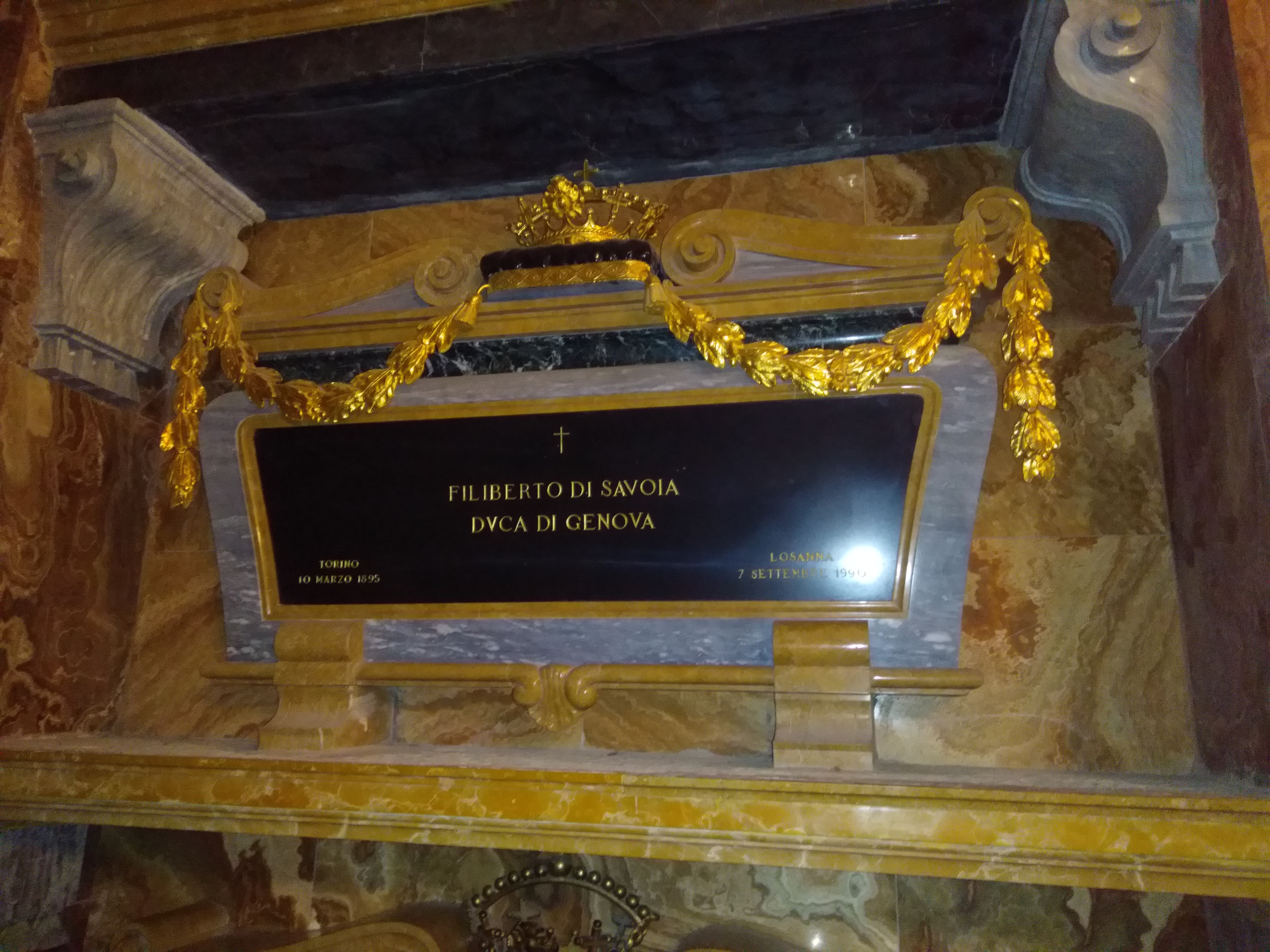 Sepoltura di Filiberto di Savoia duca di Genova (cripta di Superga)